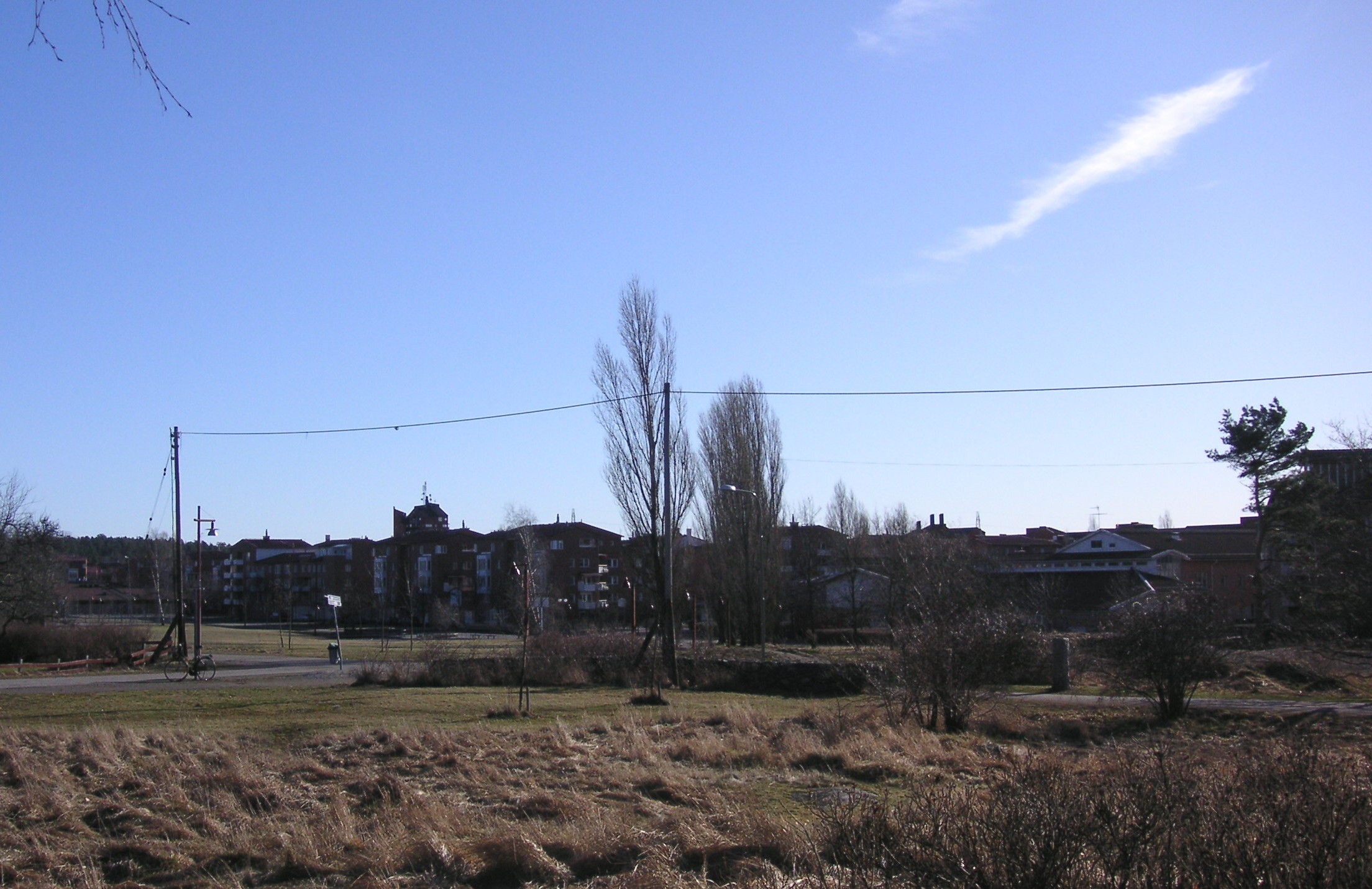 Skarpnäcksfältet efter bebyggelsen